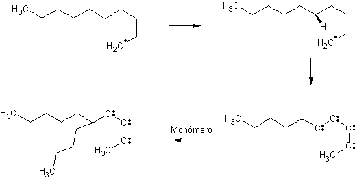 polimerização radicalar